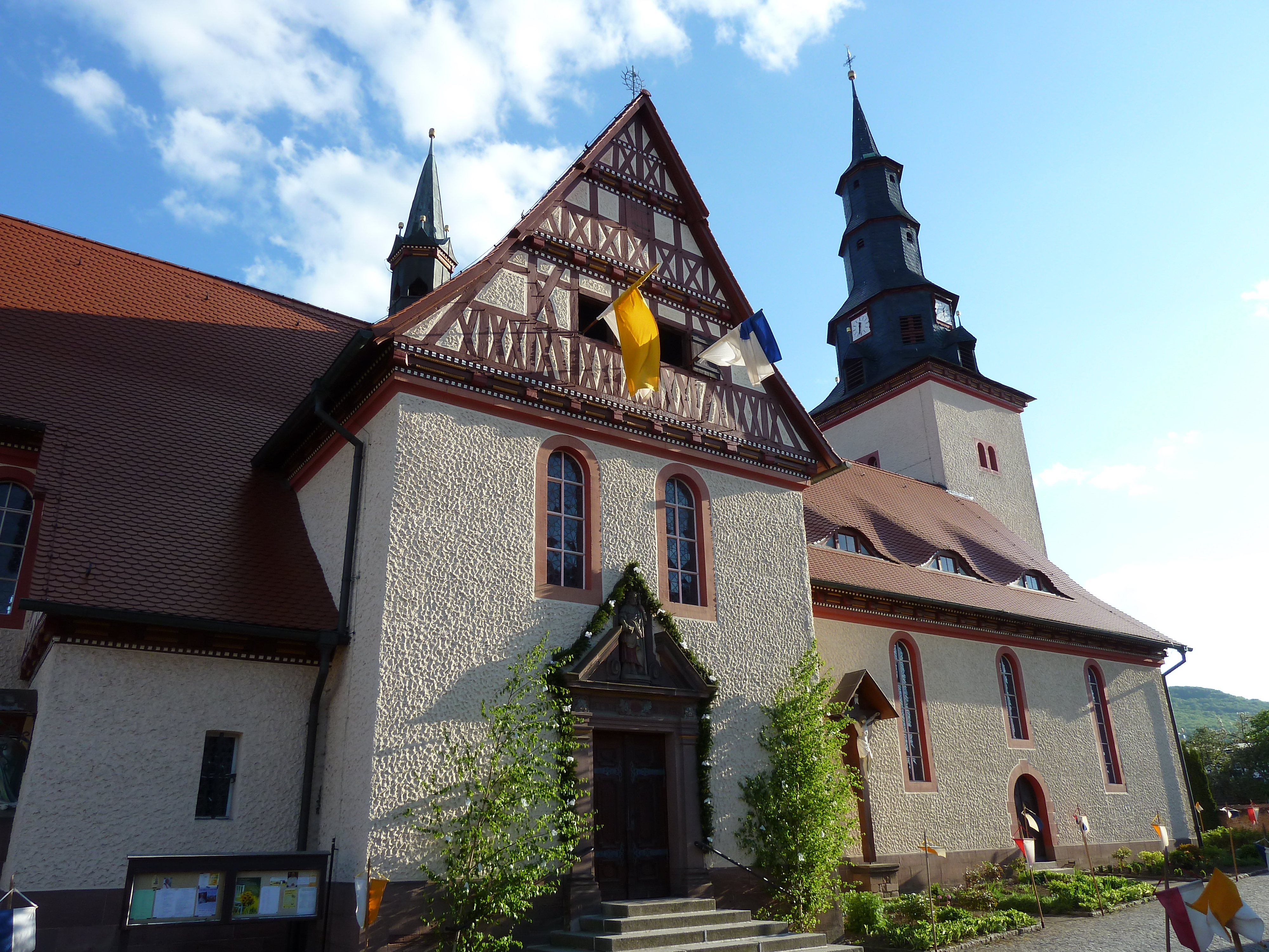 Katholische Pfarrkirche St. Jakobus in Uder, Landkreis Eichsfeld, Thüringen.